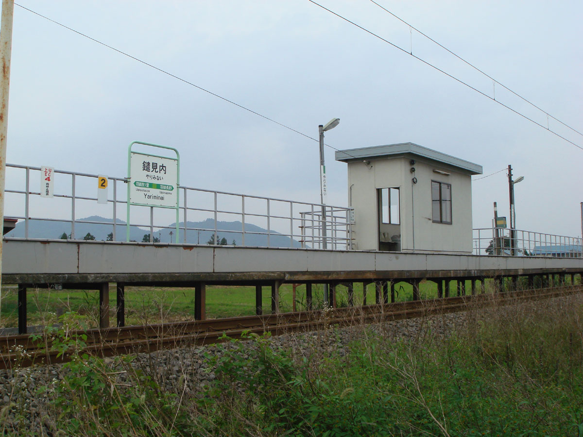 Yariminai Station, on the Tazawako Line, Daisen, Akita, Japan